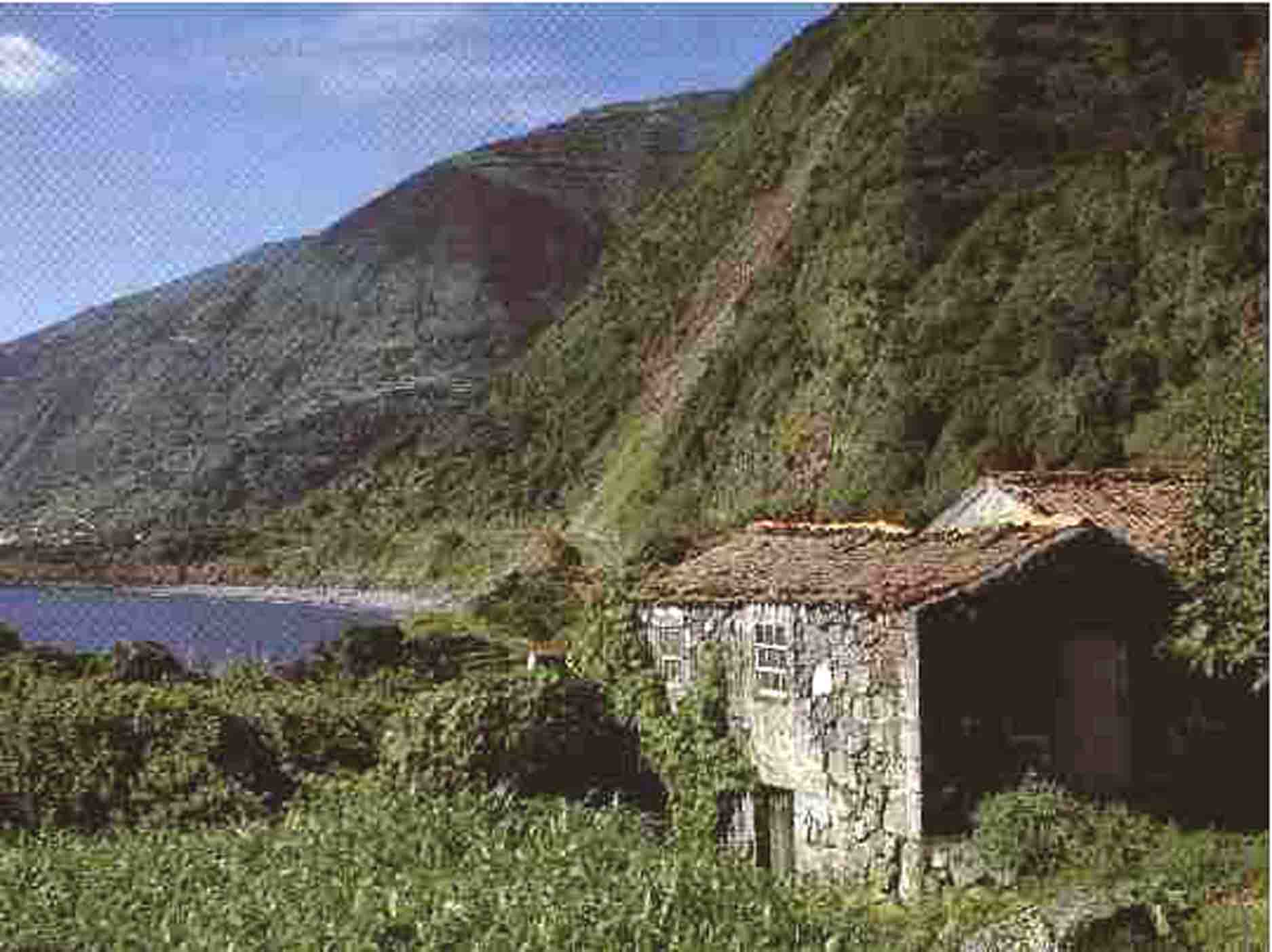 Fajã dos bodes, ilha de São Jorge, Açores, Portugal.